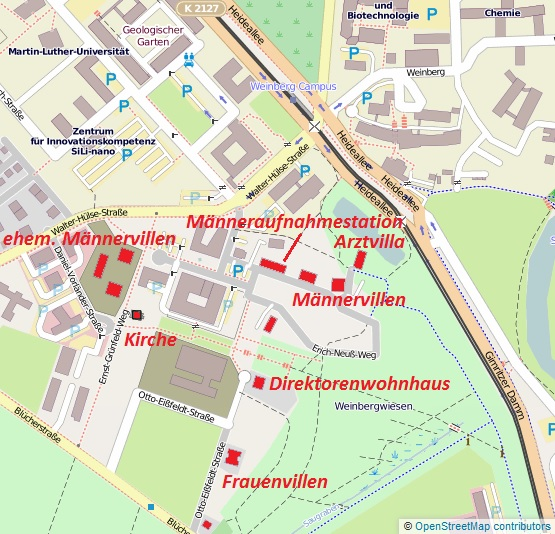 Bestandsgebäude Heilanstalt Nietleben (Halle (Saale)), 2013